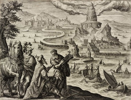 Магдалена ван де Пасс, художниця-гравер з Голландії